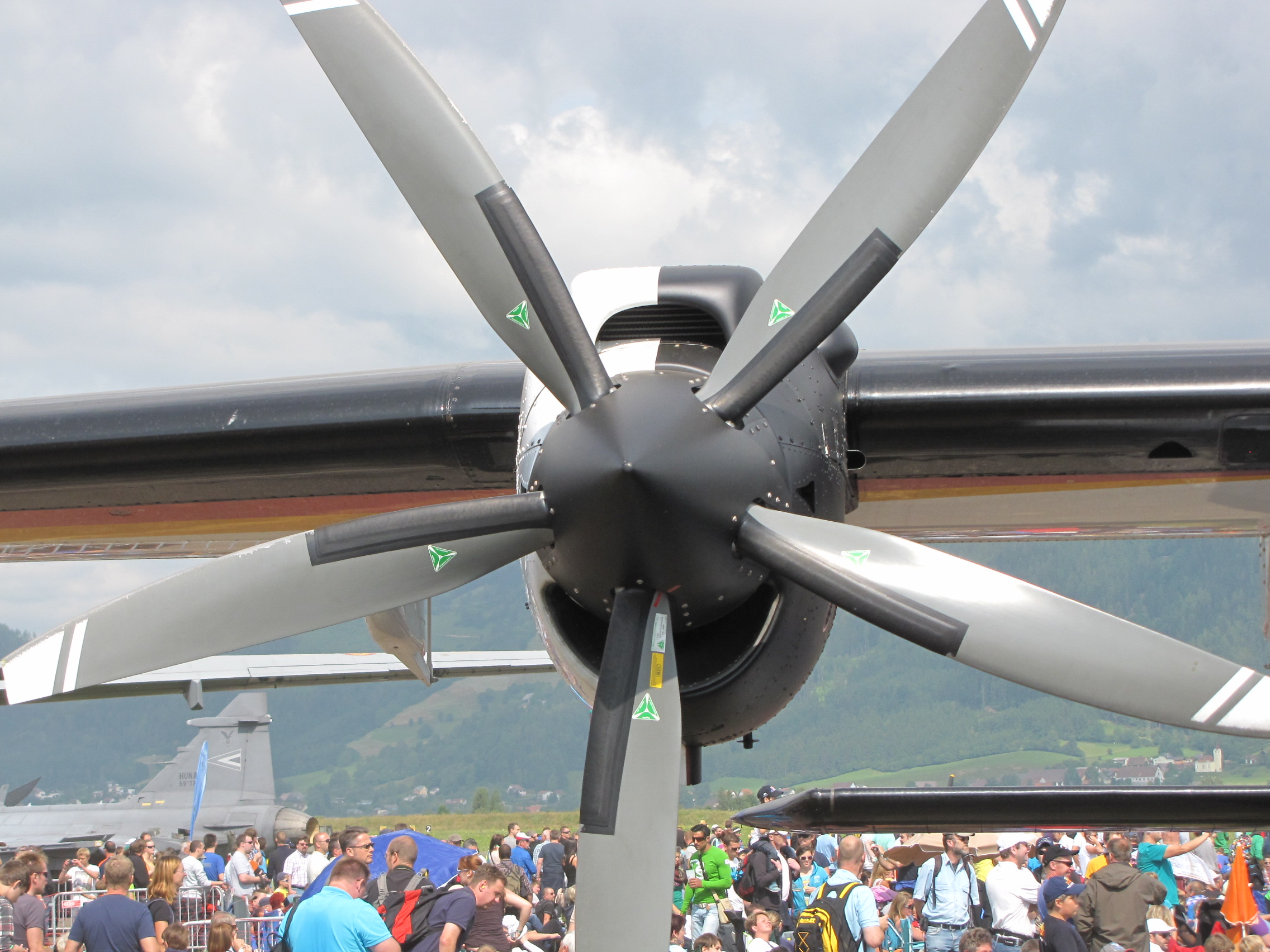 Dornier DO 228 LM, Gyártó: Fa. Dornier, AirPower 2013